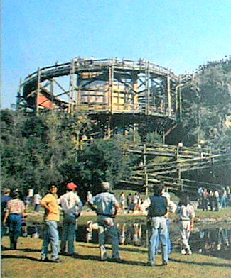 UNILIVRE ou ULMA - Universidade Livre do Meio Ambiente, em Curitiba, Paraná, Brasil.